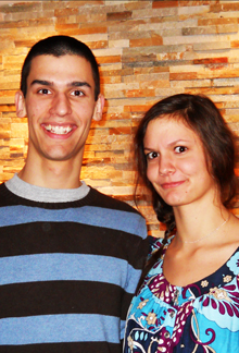 exemple de jumeaux dizygotes